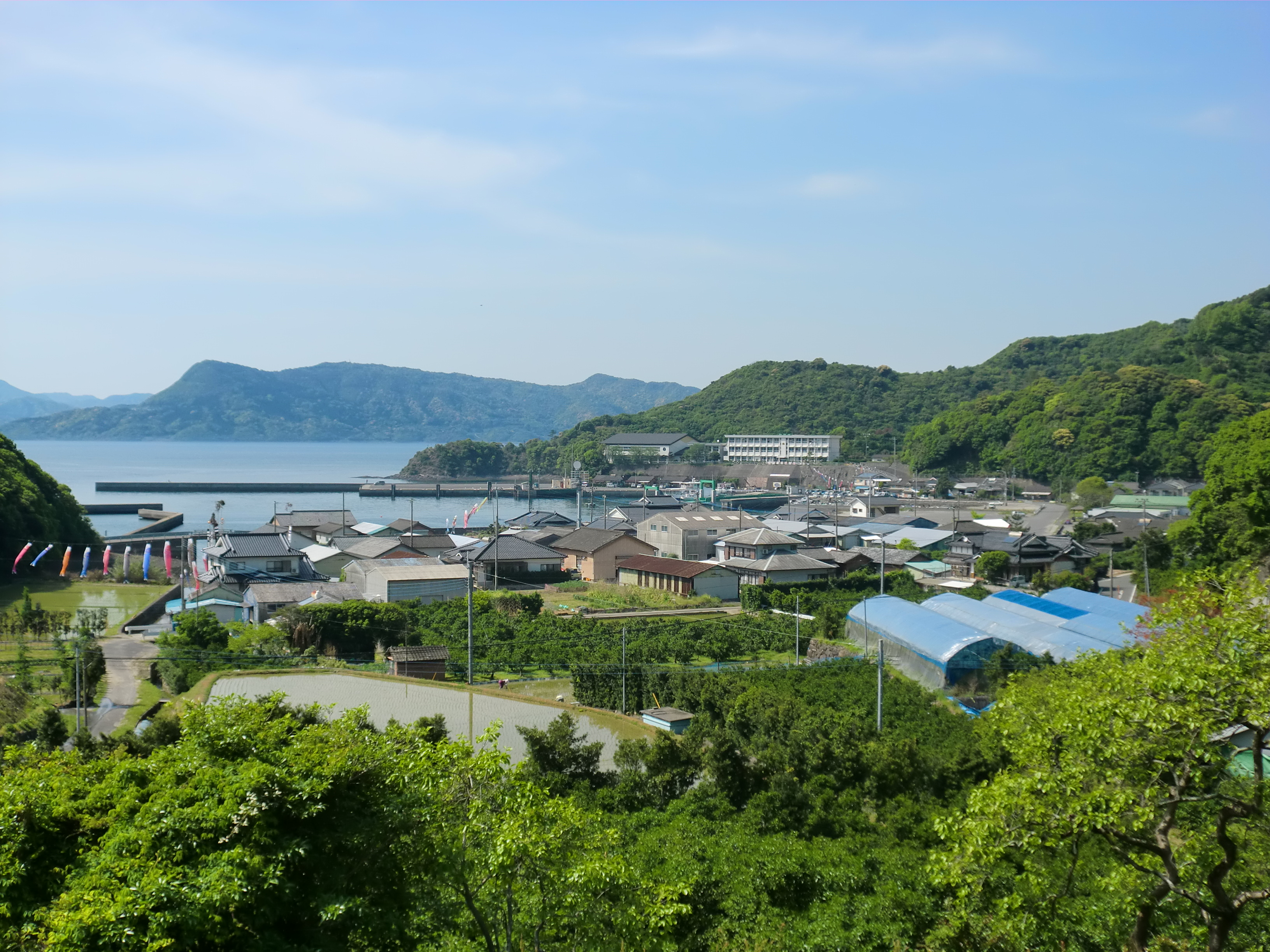 鹿児島県出水郡長島町獅子島の片側（かたそば）